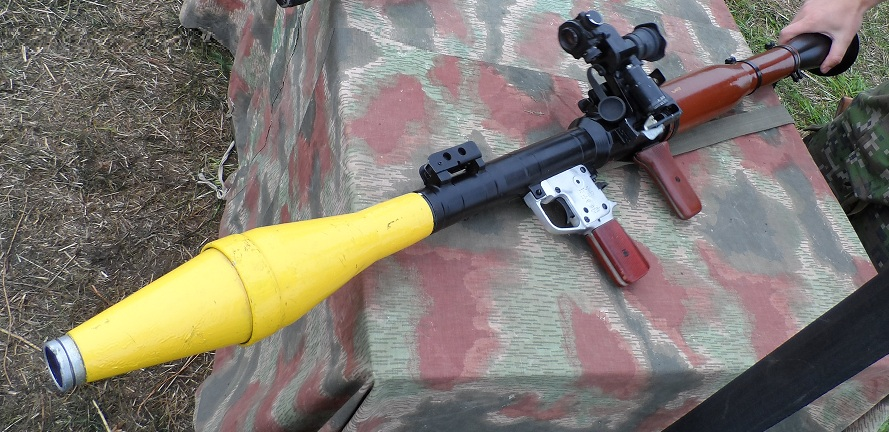 Pôvodna verzia s granatom PG-7V a zameriavačom PGO-7V.